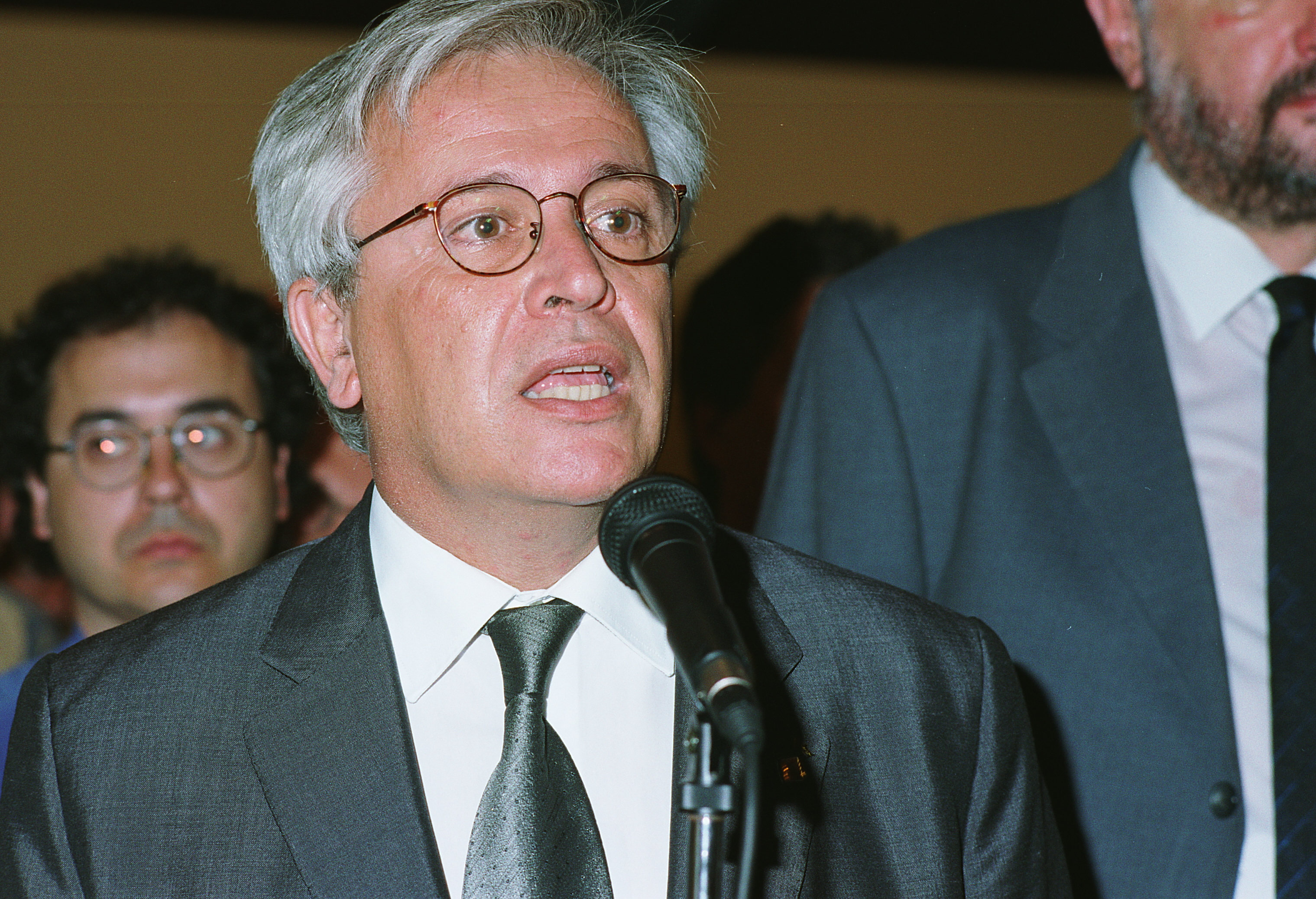 Joan Clos al MHC el 2001.